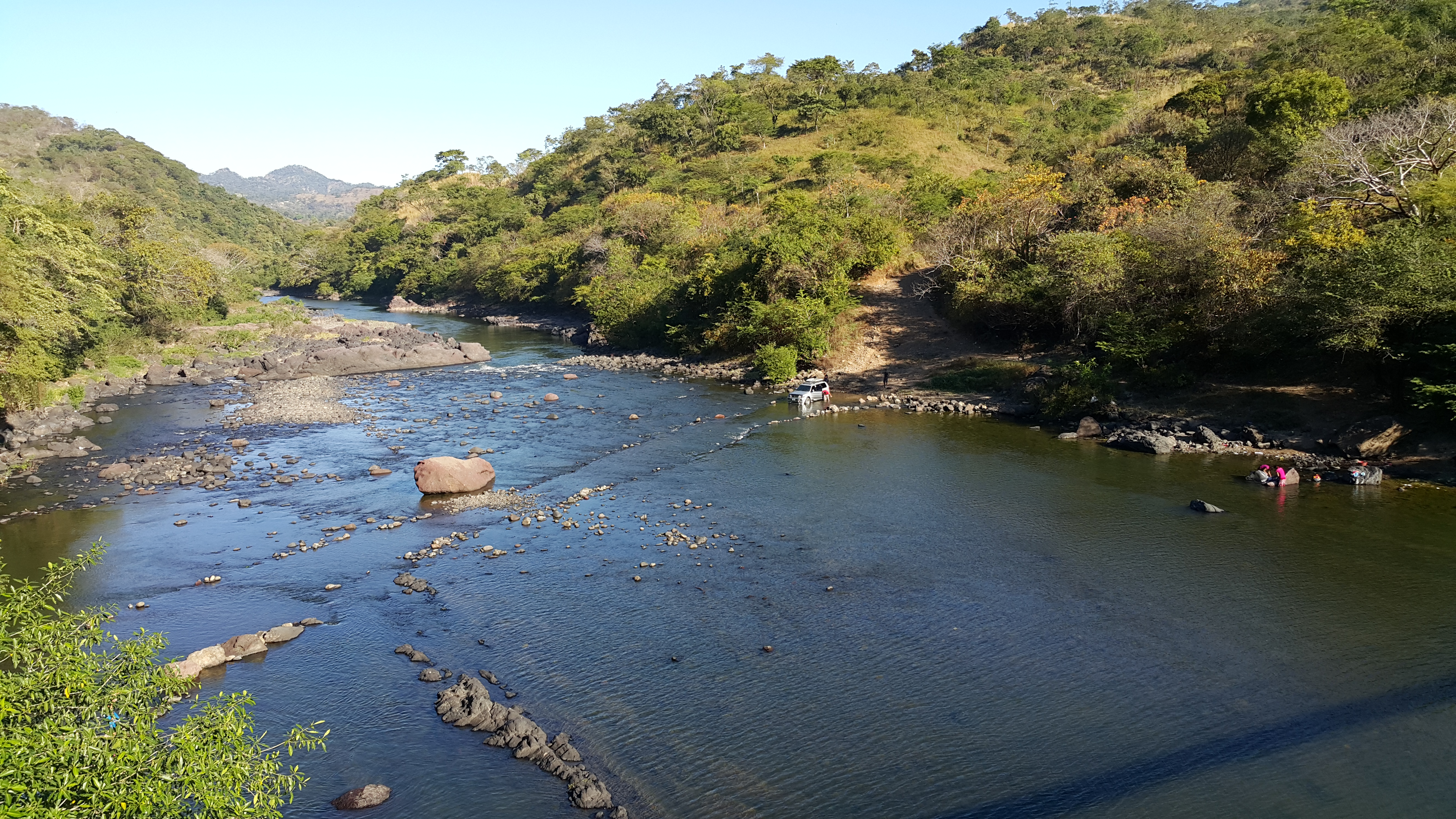 Panoramica río Torola.